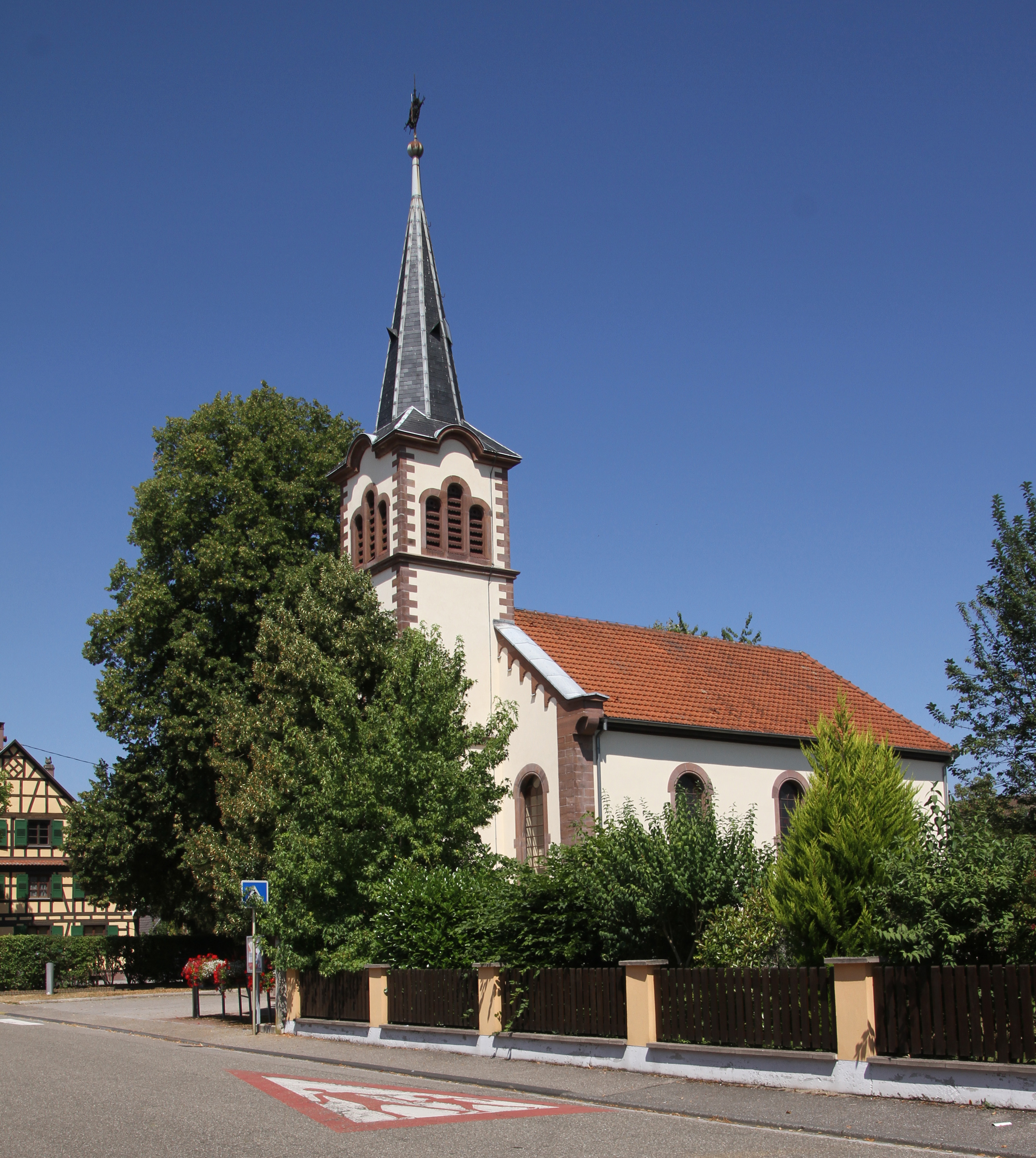 Dalhunden